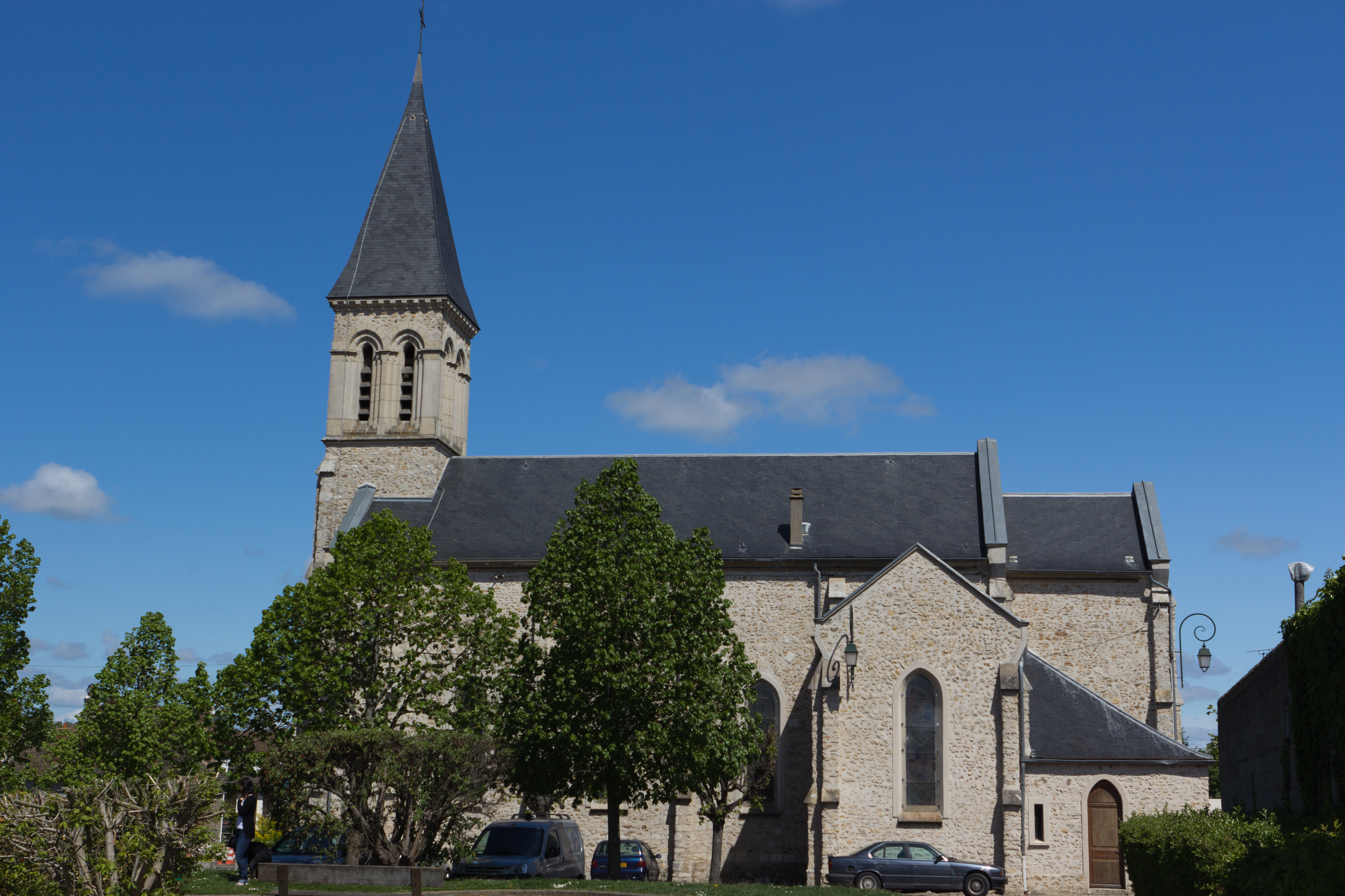 Eglise de Ballancourt-sur-Essonne, Ballancourt-sur-Essonne, département de L'Essonne, France